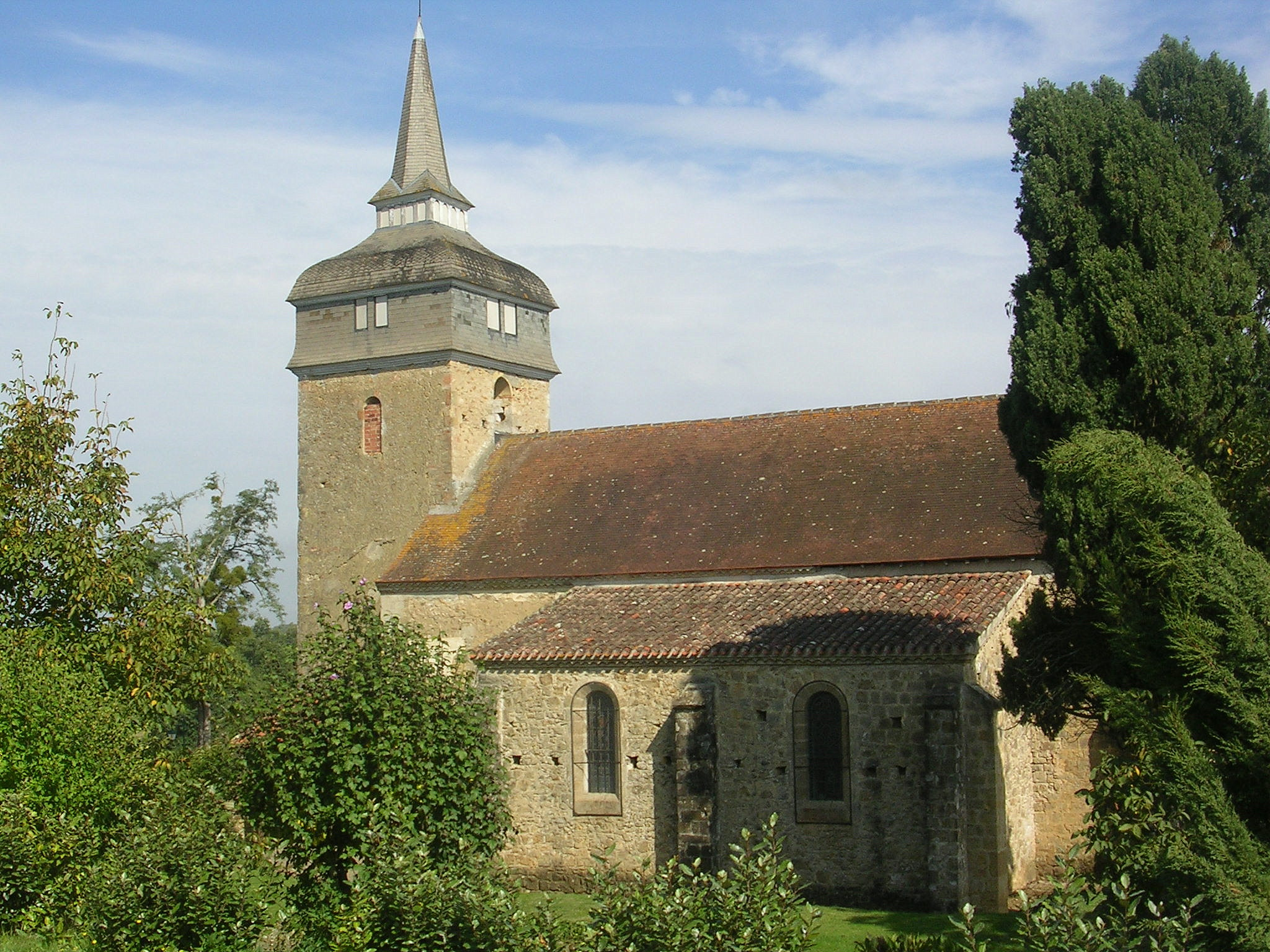 Termes d'Armagnac (Gers, France), l'église